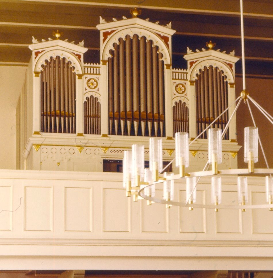 Orgel in Mittegroßefehn 1859 von Winter